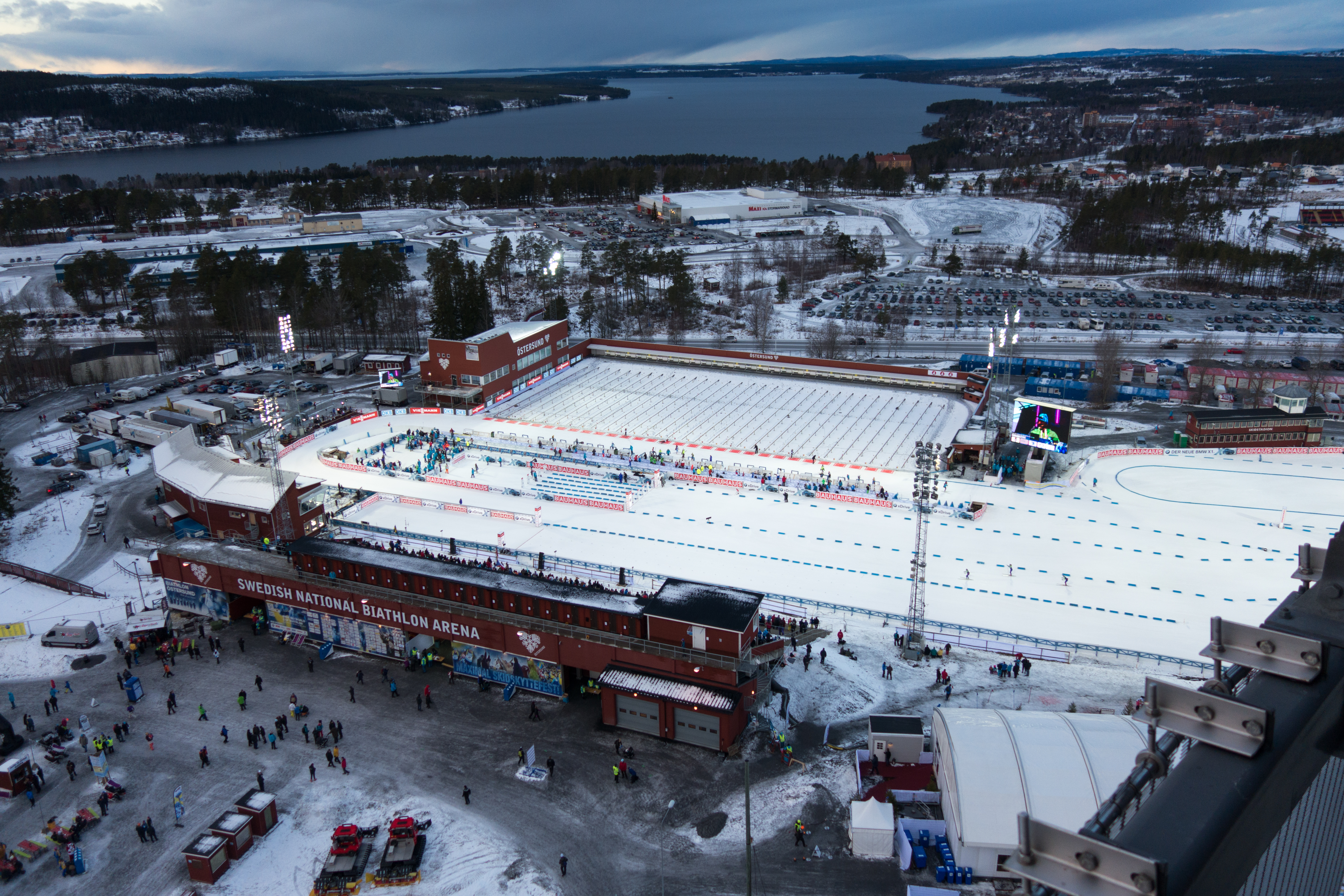 Skidskytte arenan i Östersund under Världscupen i Skidskytte